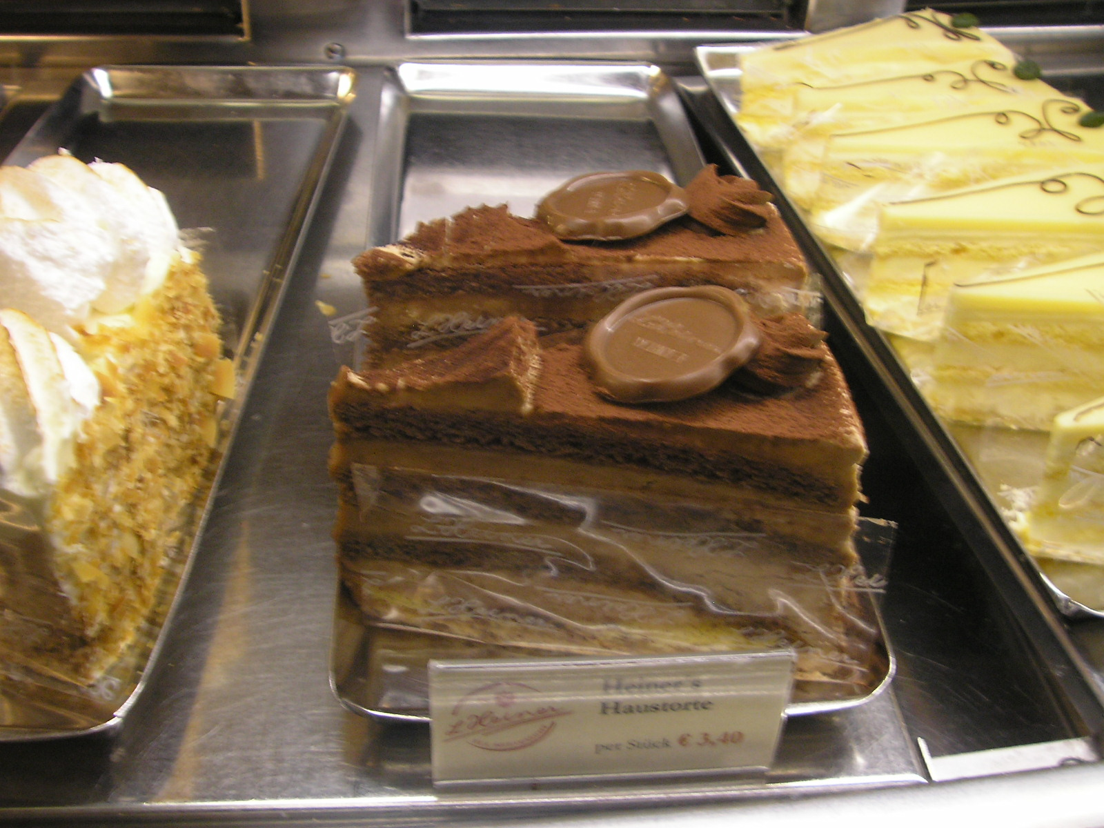 "Heiner's Haustorte" cake at the L. Heiner cafe at Wollzeile in Vienna.